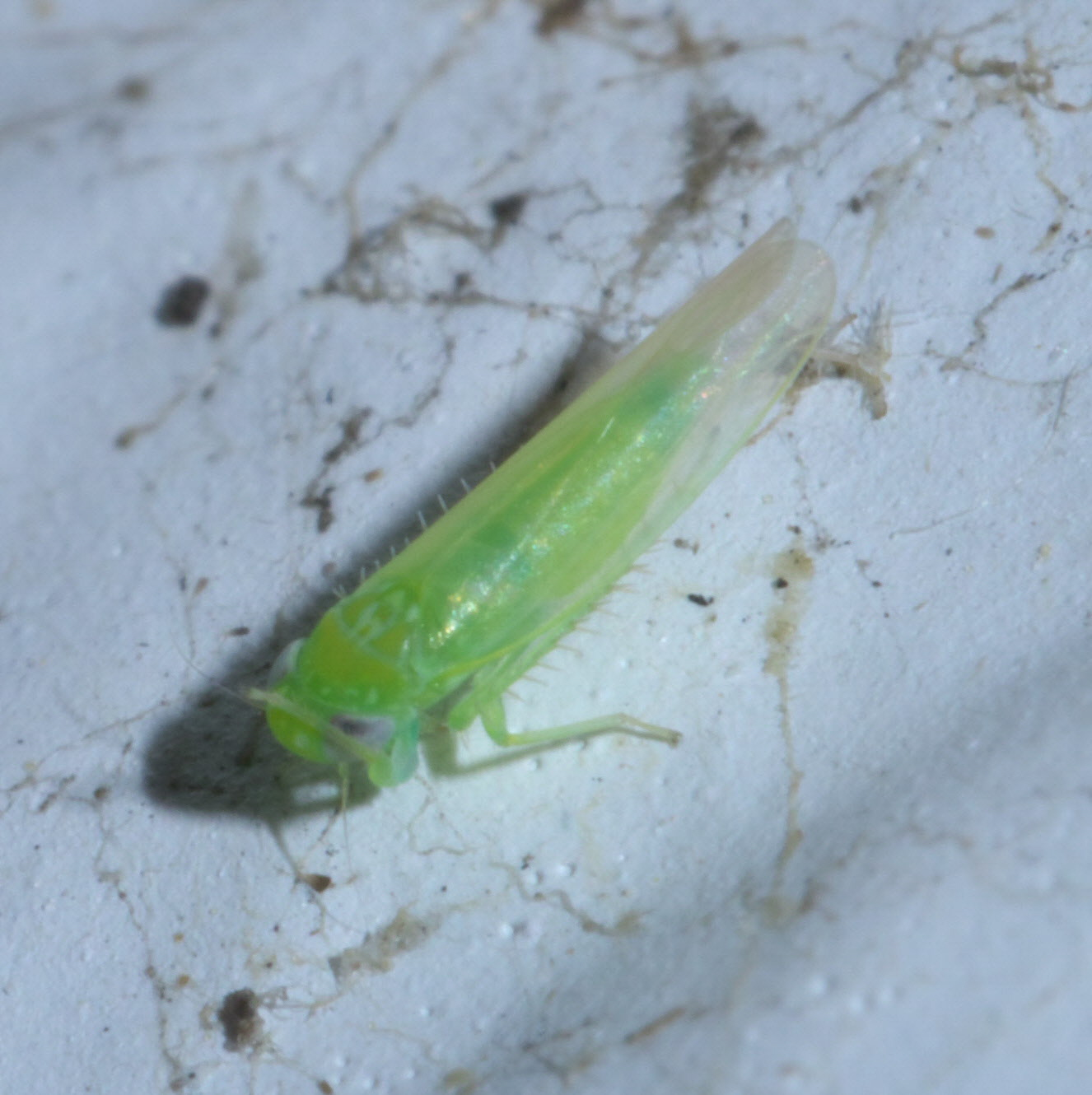 Empoasca fabae, potato leafhopper, Size: 3.3 mm